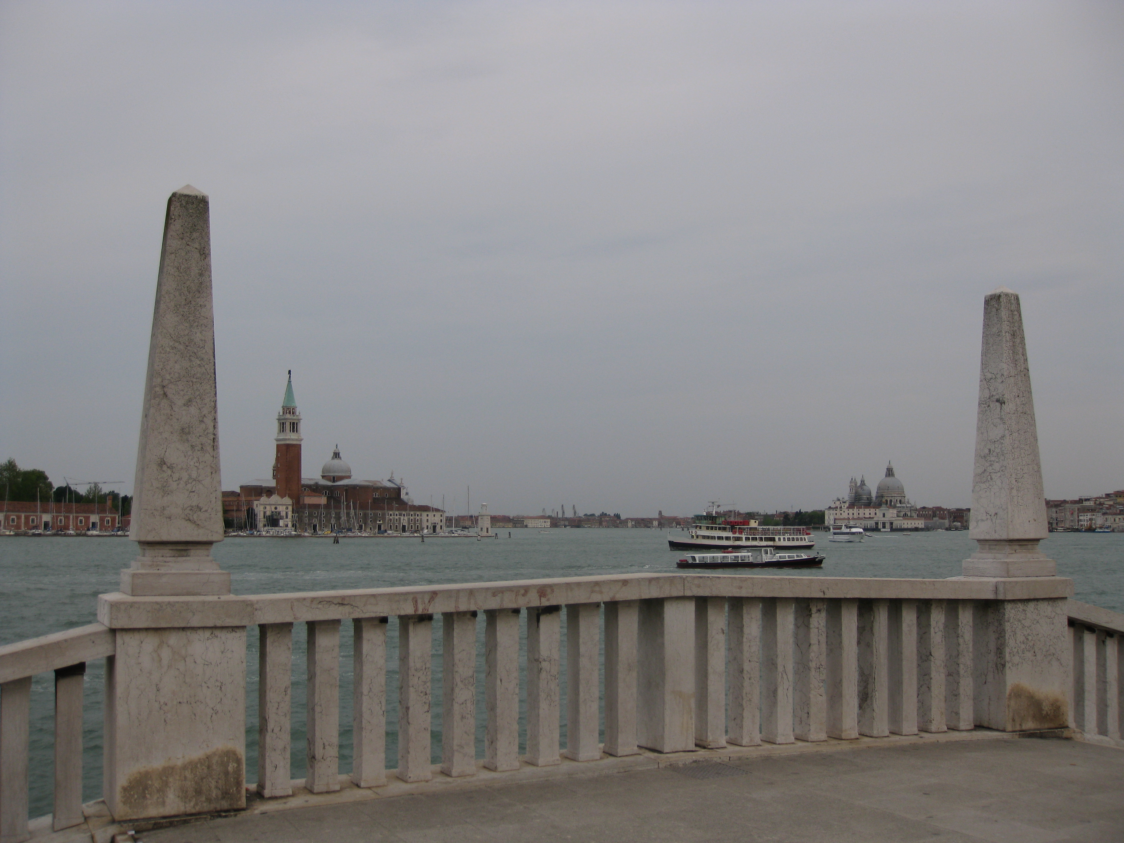 San Marko at sunset סן מרקו לעת השקיעה: ארמון הדוג'ים והקמפנילייה (מגדל השעון) של סן מרקו